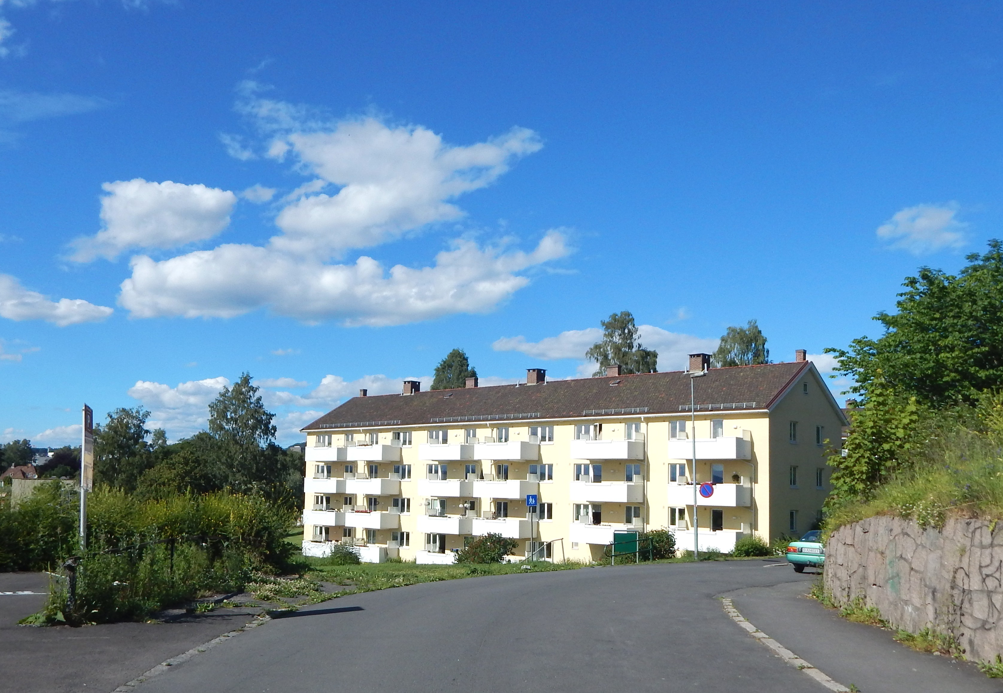 Bergljots vei